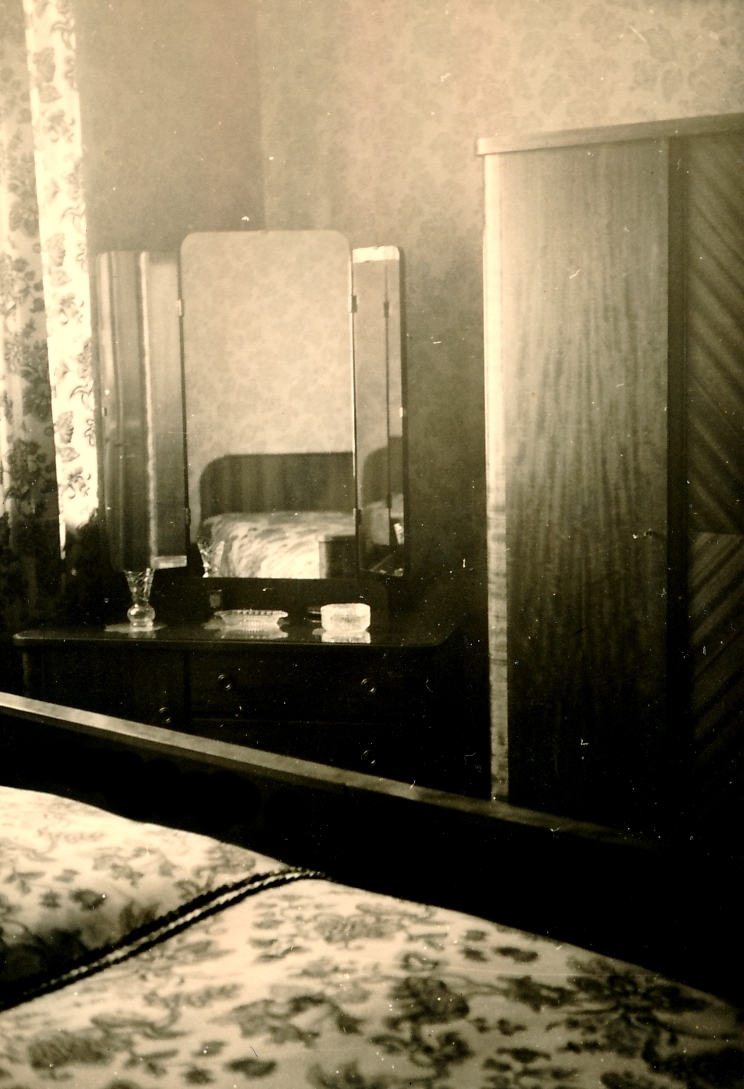 Schlafzimmer-Einrichtung zwischen dem Kriegsende 1945 und der Währungsreform 1948